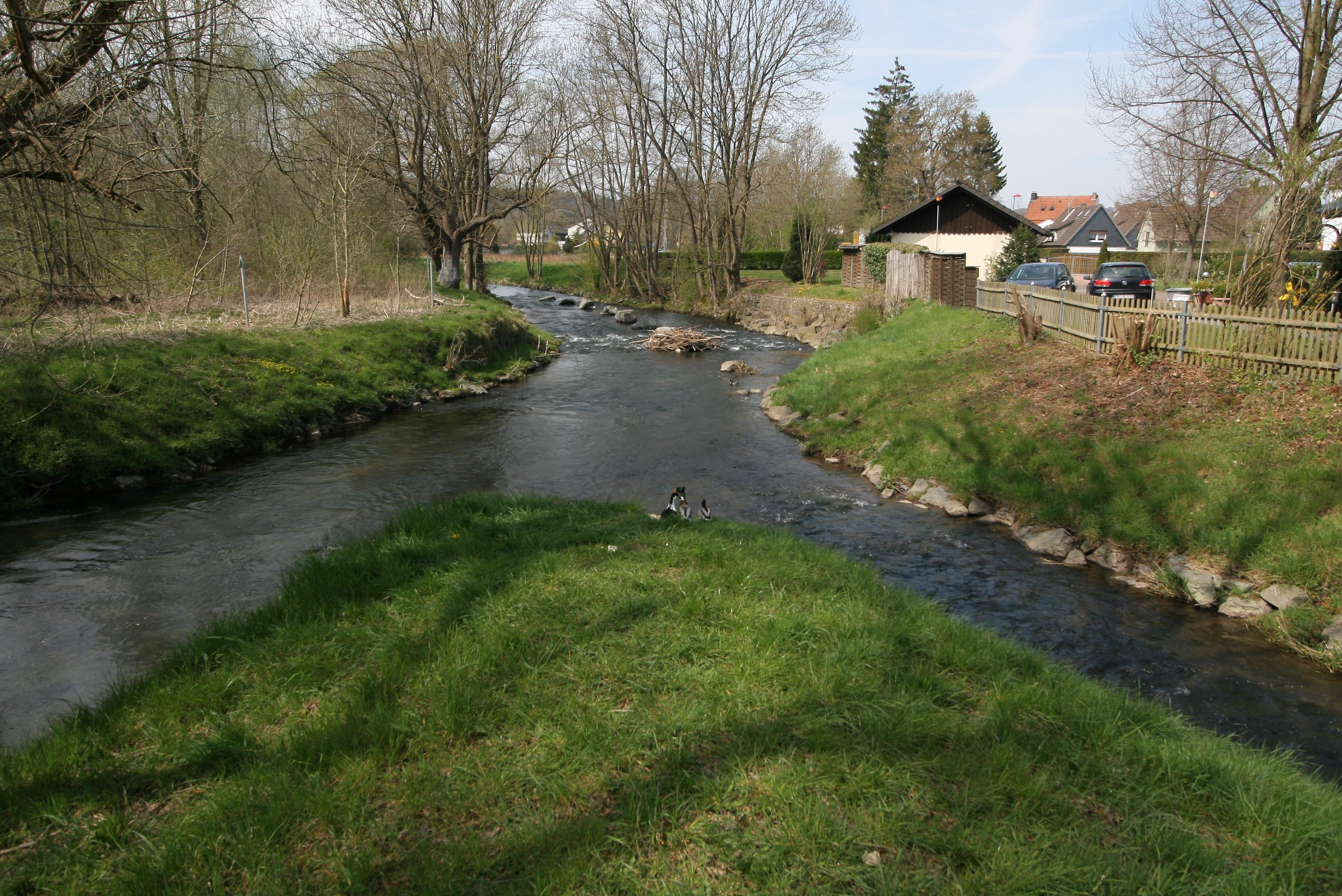 Mündung des Bieberbachs (von rechts) in die Hönne in Menden (Sauerland), Ortsteil Lendringsen.